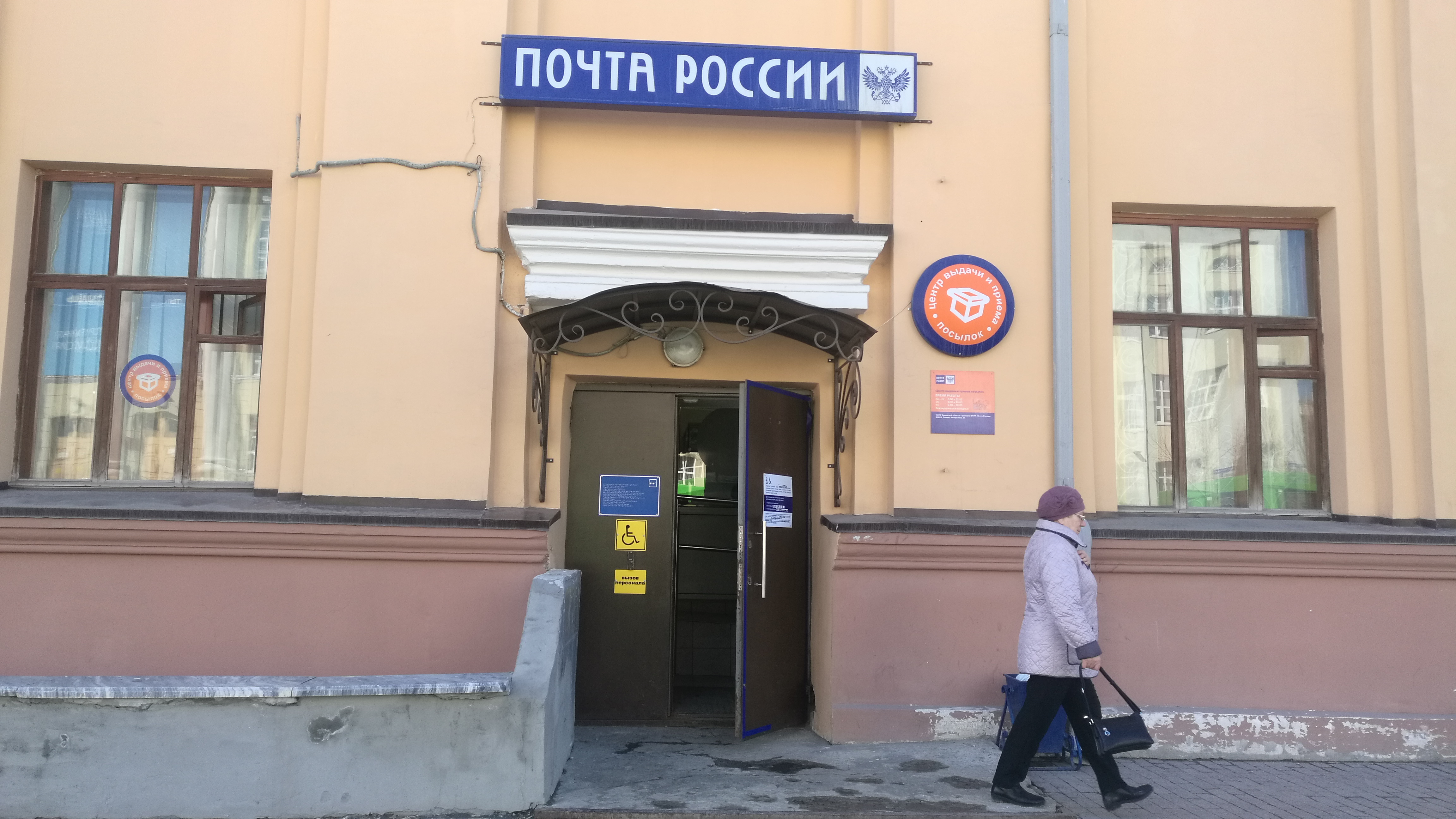 La Ĉefpoŝtejo. Tjumeno, Rusio.